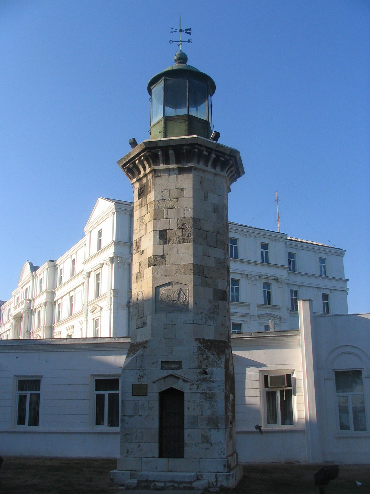 Farul Genovez, Constanta